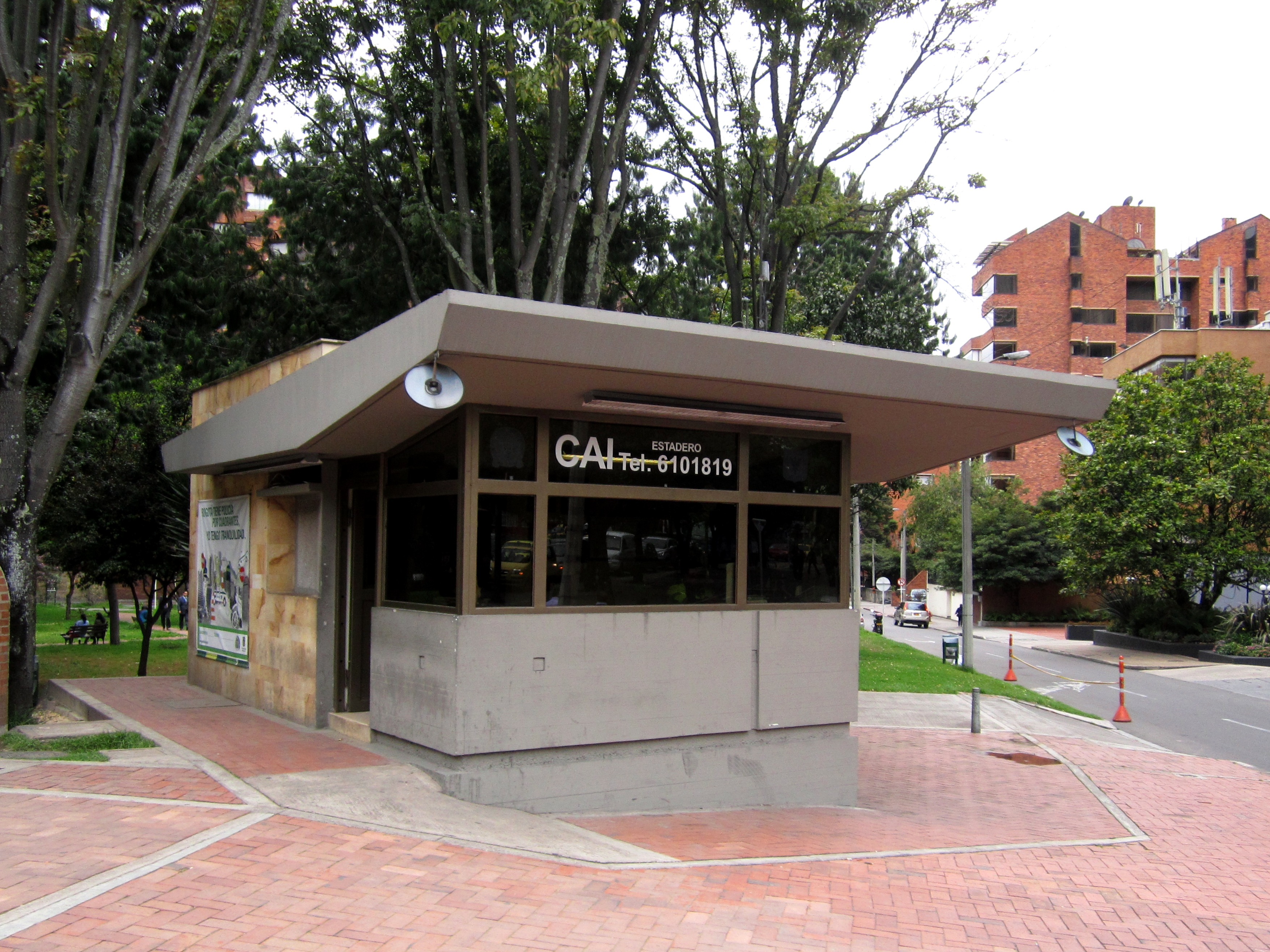 Bogotá